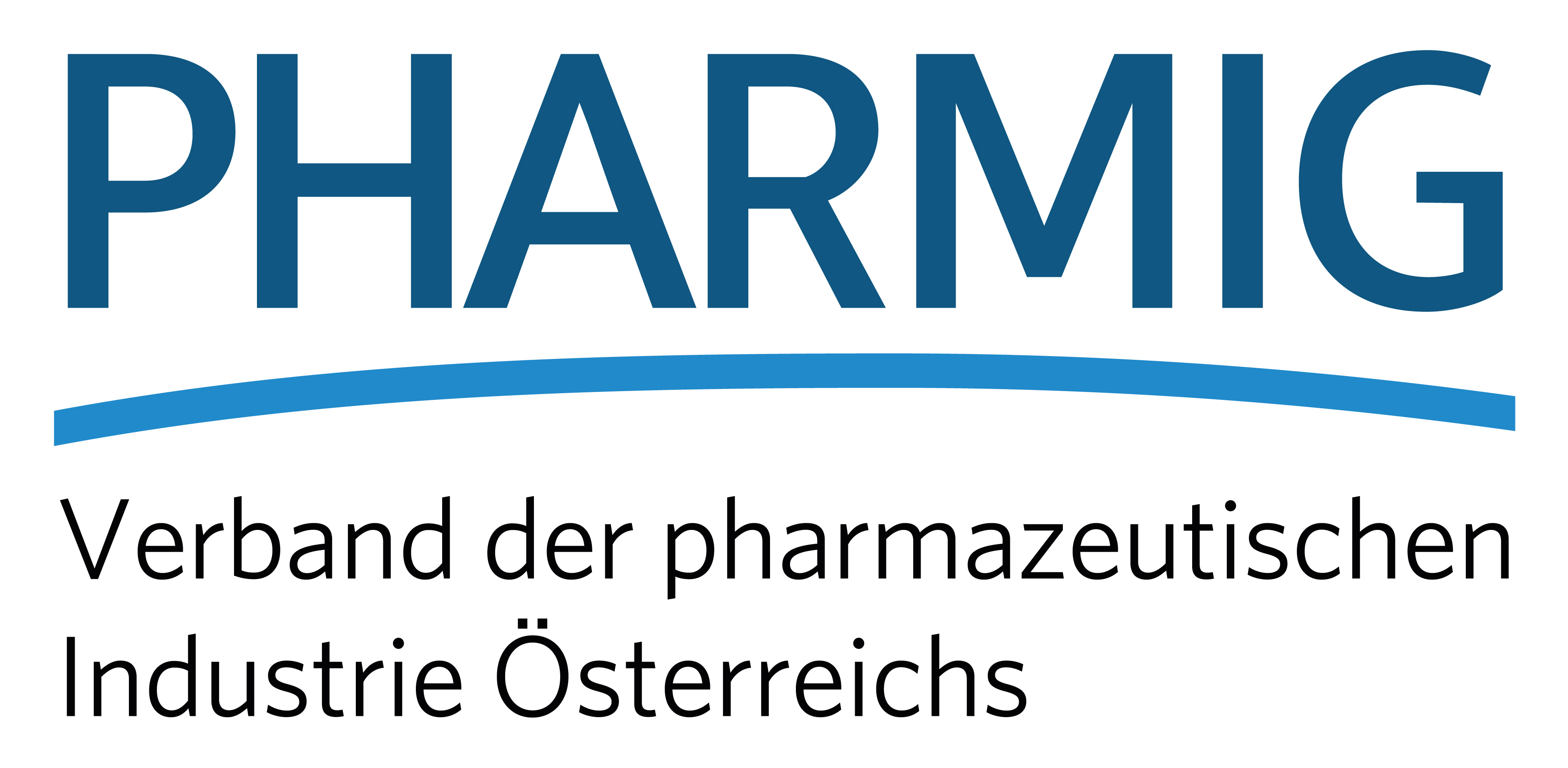 neues Logo der Pharmig ab 1.5.2017